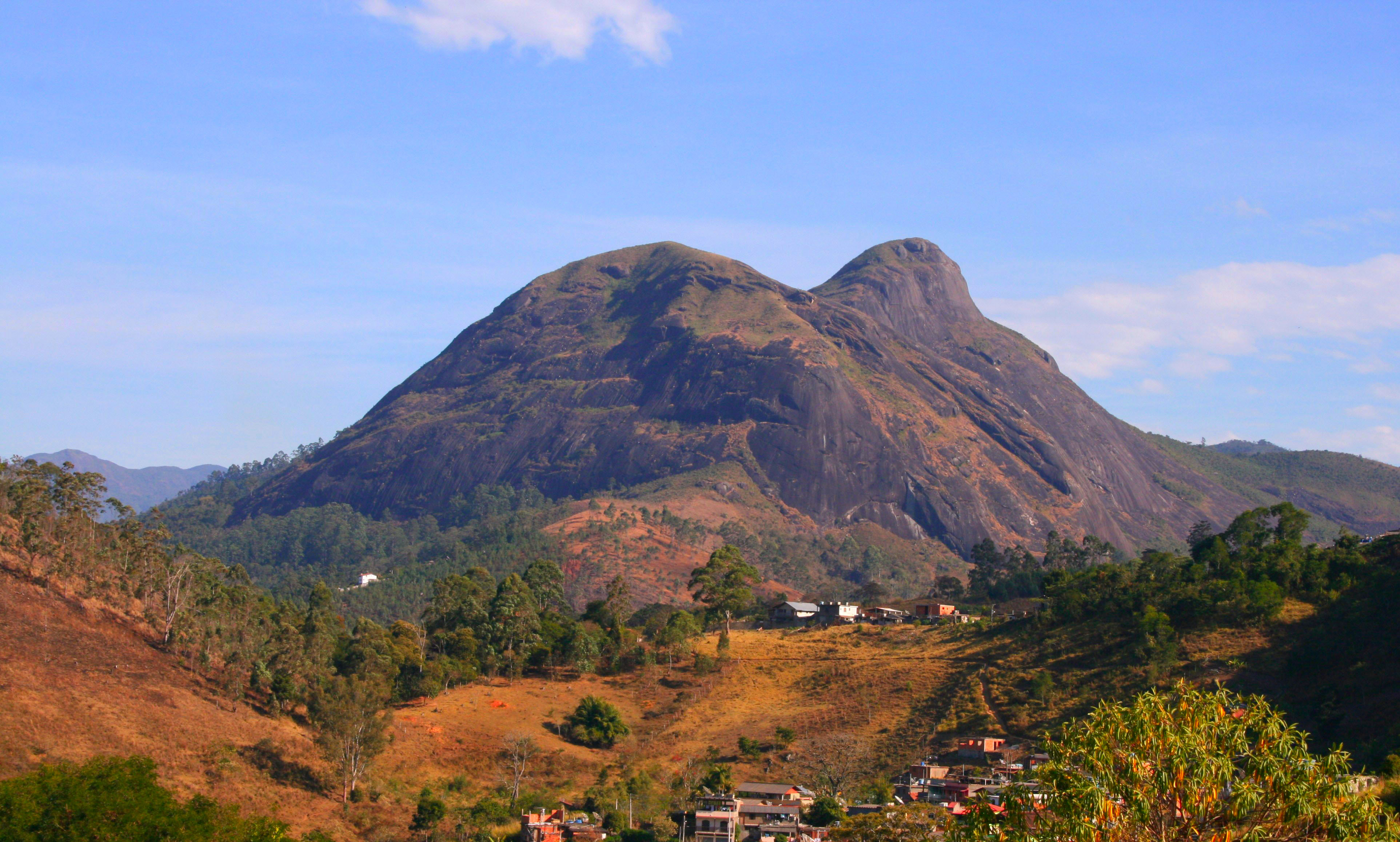 Pedra da tartarugaTurtle Rock